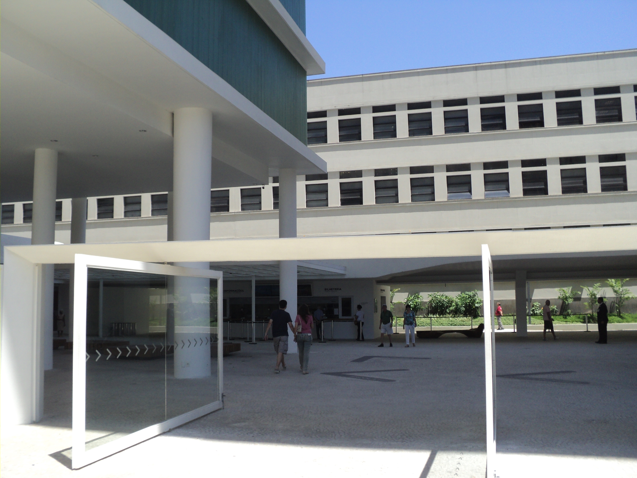 Entrada do Museu de Arte do Rio. A esquerda a Escola do Olhar e, ao fundo, a antiga rodoviária Mariano Procópio.